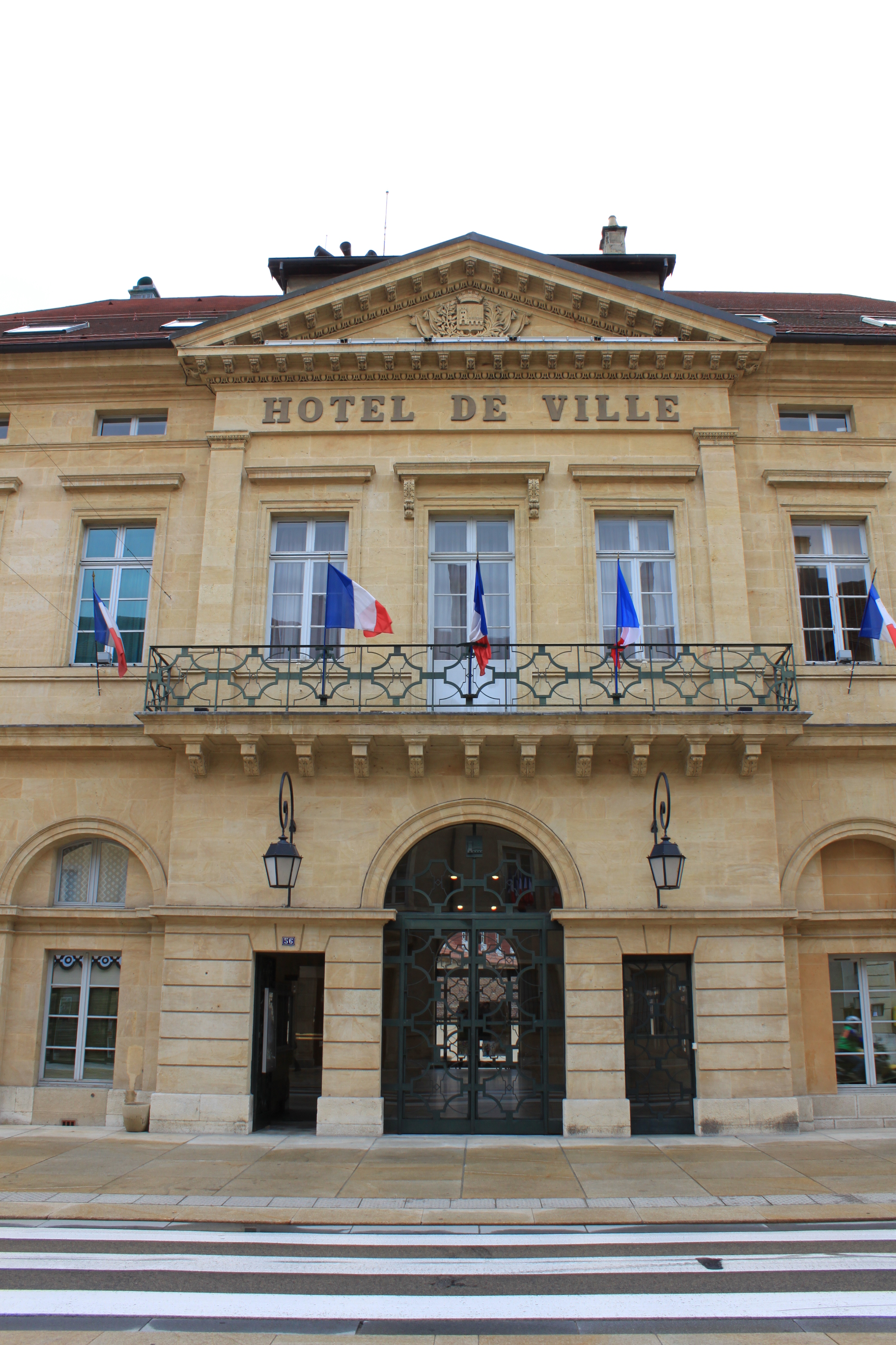 Hôtel de ville, Pontarlier, Doubs, Franche-Comté, France